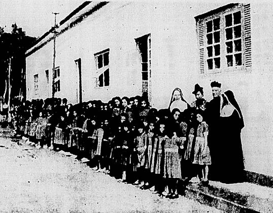 Correio Da Manhã (RJ) ed,14321, 12 de julho de 1941